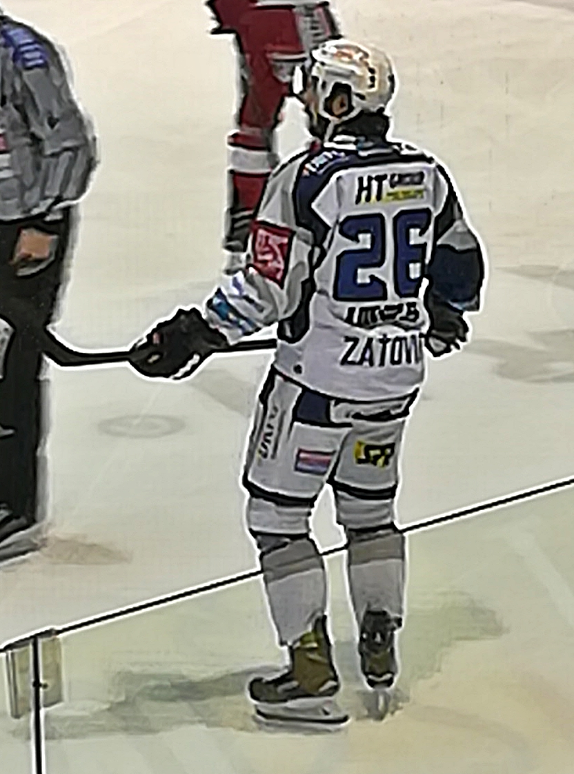 HC Olomouc - HC Kometa. Brno